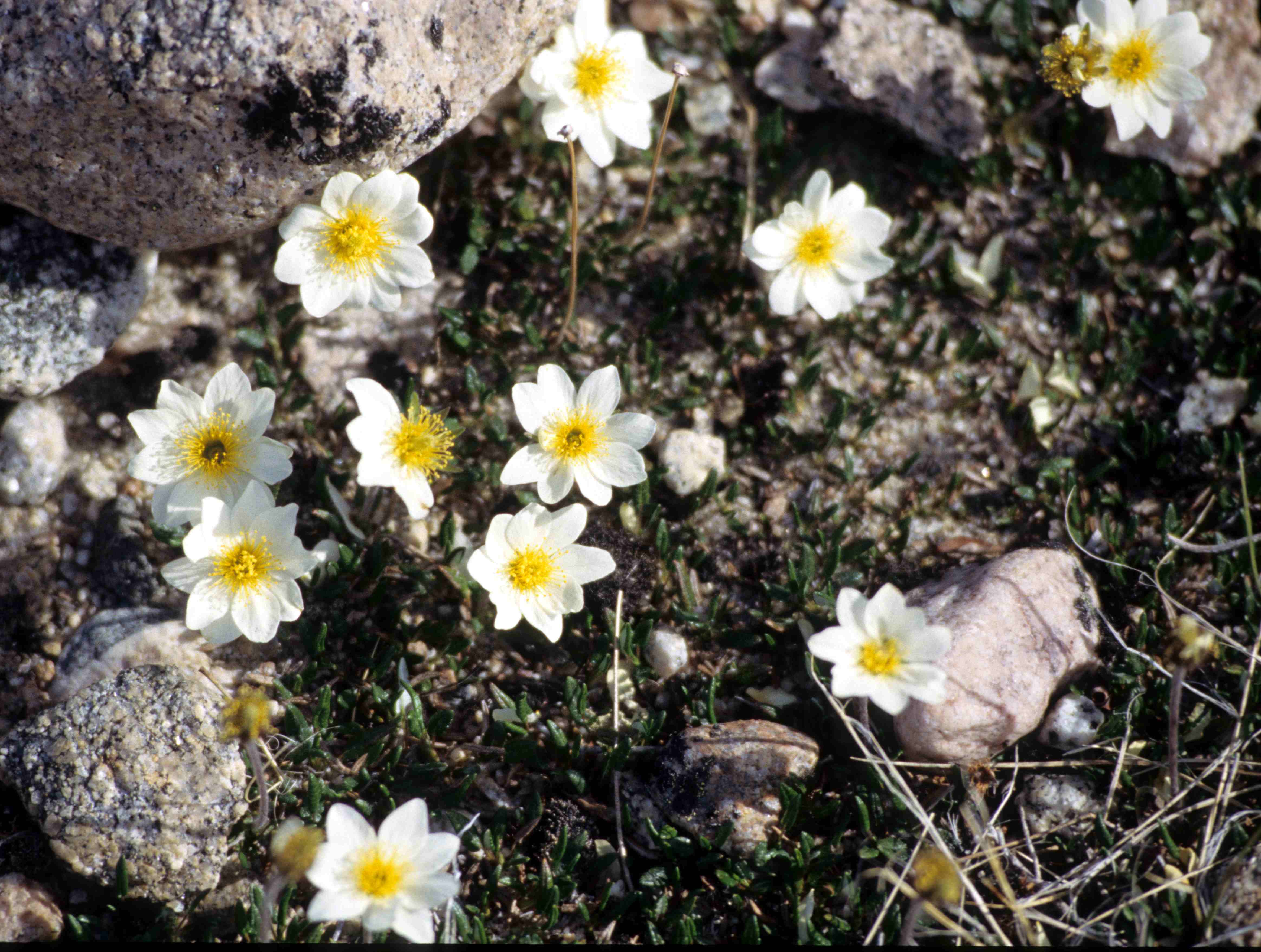 Flowering Mountain Avens, Dryas integrifolia (Ukkusiksalik National Park, Nunavut, Canada)